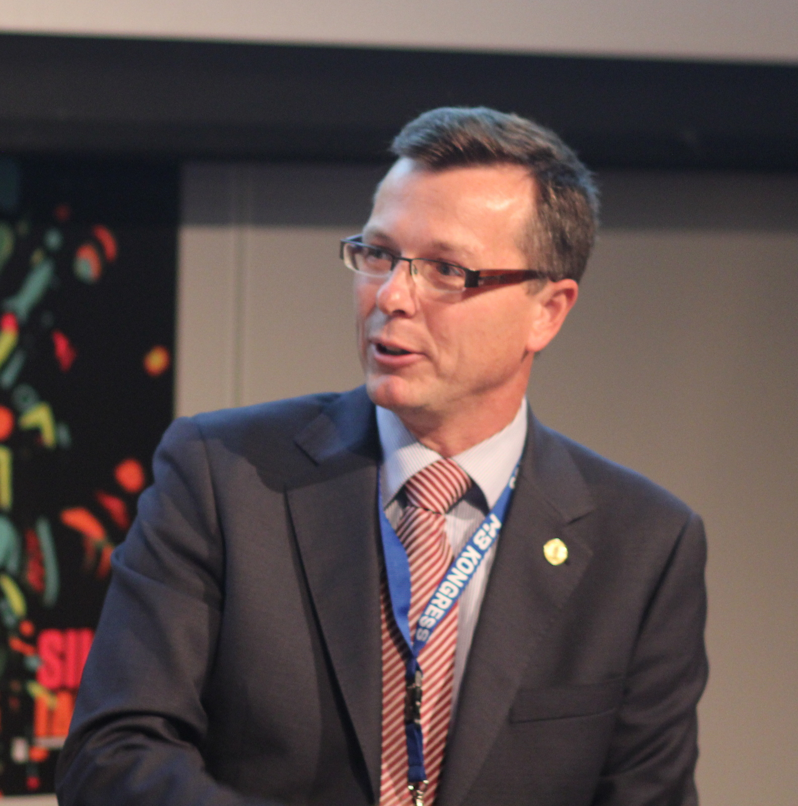 Dag Rune Olsen